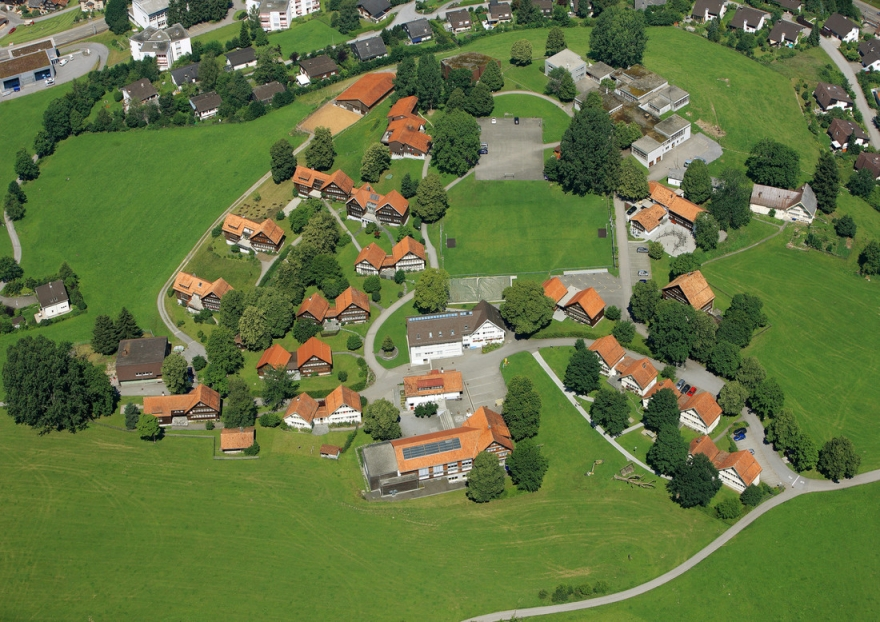 Das Kinderdorf Pestalozzi von Süden aus der Luft gesehen